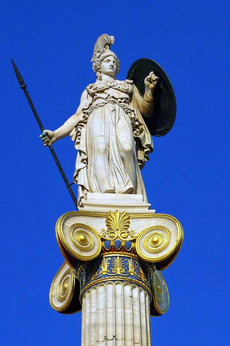 Pallas Athene vor der Akademie der Wissenschaften